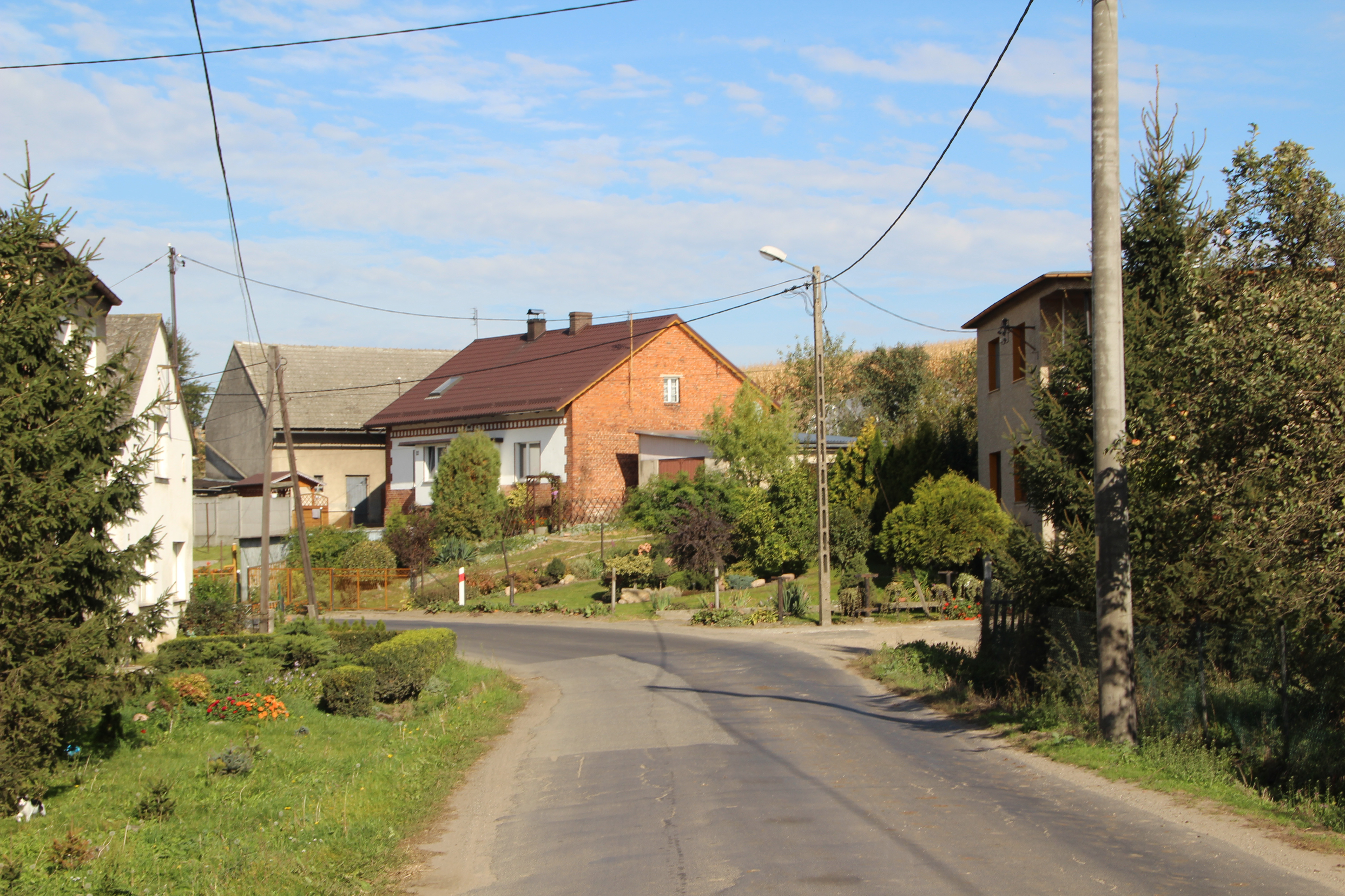 Witosławice (dodatkowa nazwa w j. niem. Witoslawitz)- wieś w Polsce położona w województwie opolskim, w powiecie kędzierzyńsko-kozielskim, w gminie Polska Cerekiew.